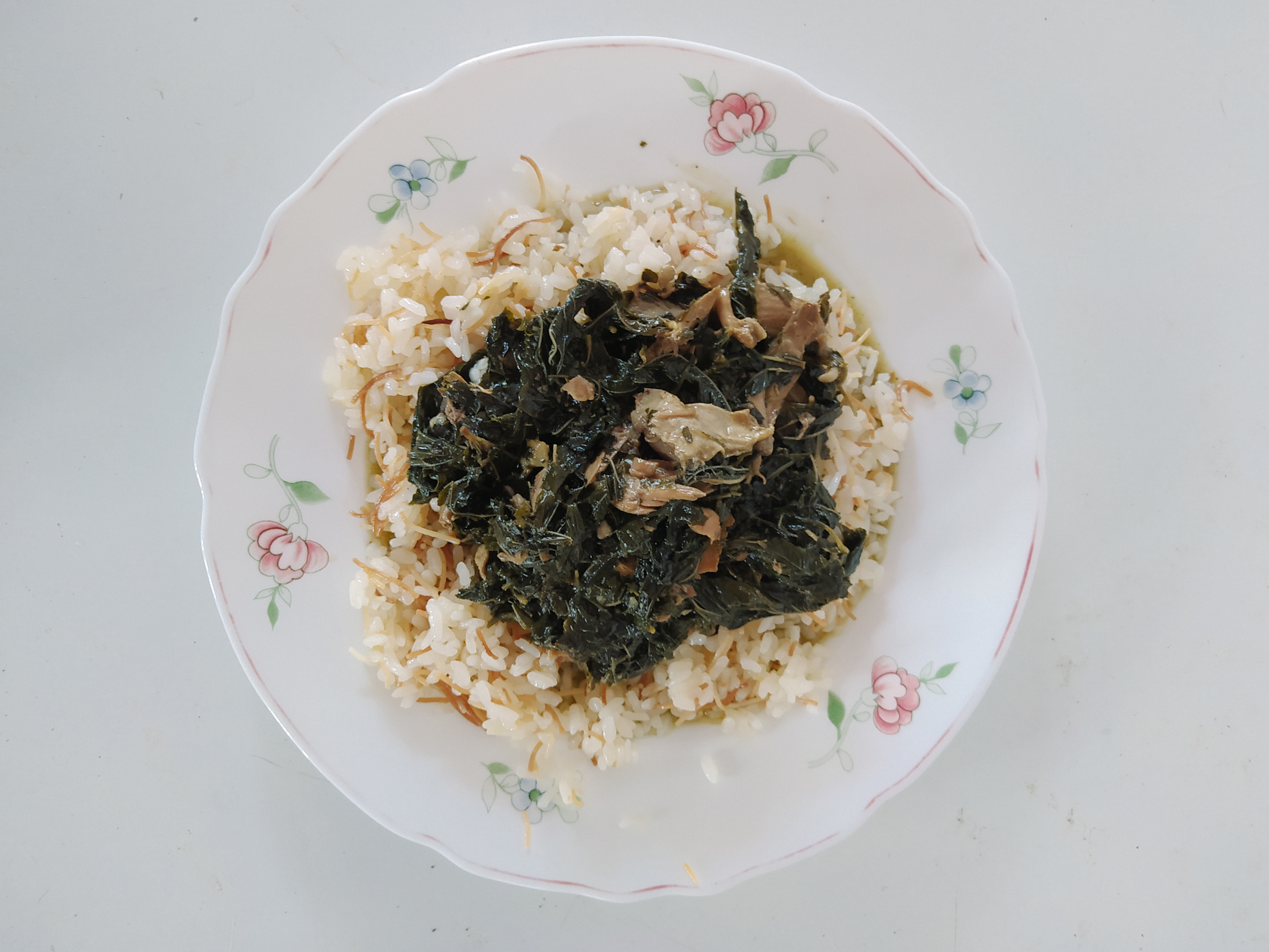 Arroz árabe (رز بالشعرية) con mulujíe o mlujíe, estilo sirio.